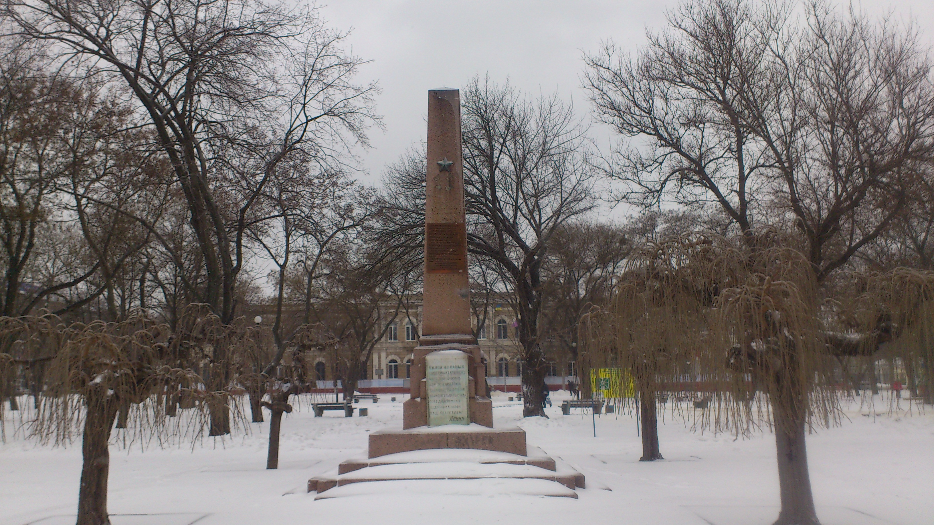 Пам'ятник Героям Сиваша